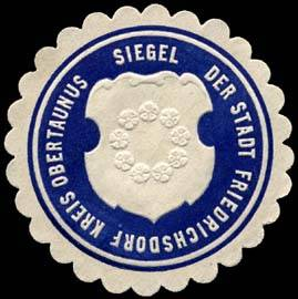 Sealing stamp Title: Siegel der Stadt Friedrichsdorf Kreis Obertaunus Description: dunkelblau, weiß, geprägt Place: Friedrichsdorf / Obertaunus size: 4 cm